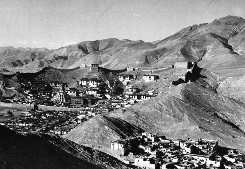 Gyantse, Festung